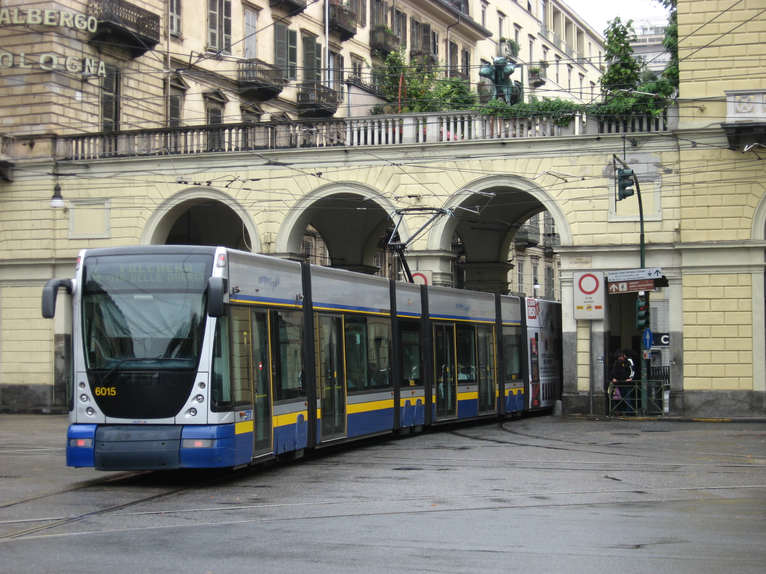 De tram in Turijn in 2009